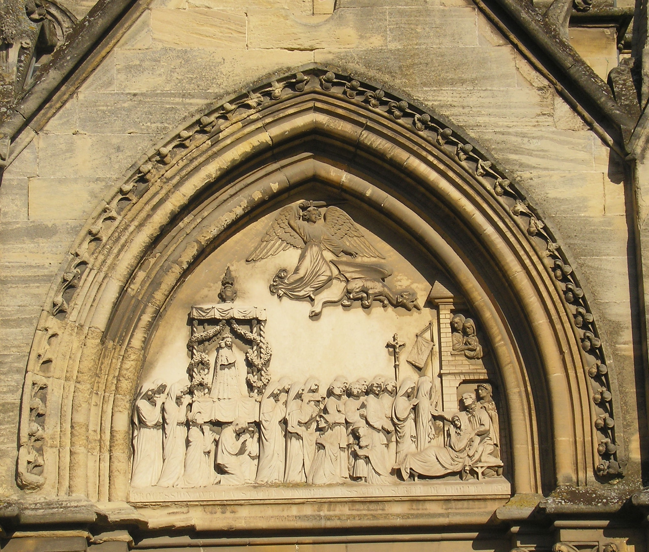 Douvres-la-Délivrande (Normandie, France). Le tympan de la basilique Notre-Dame-de-la-Délivrande